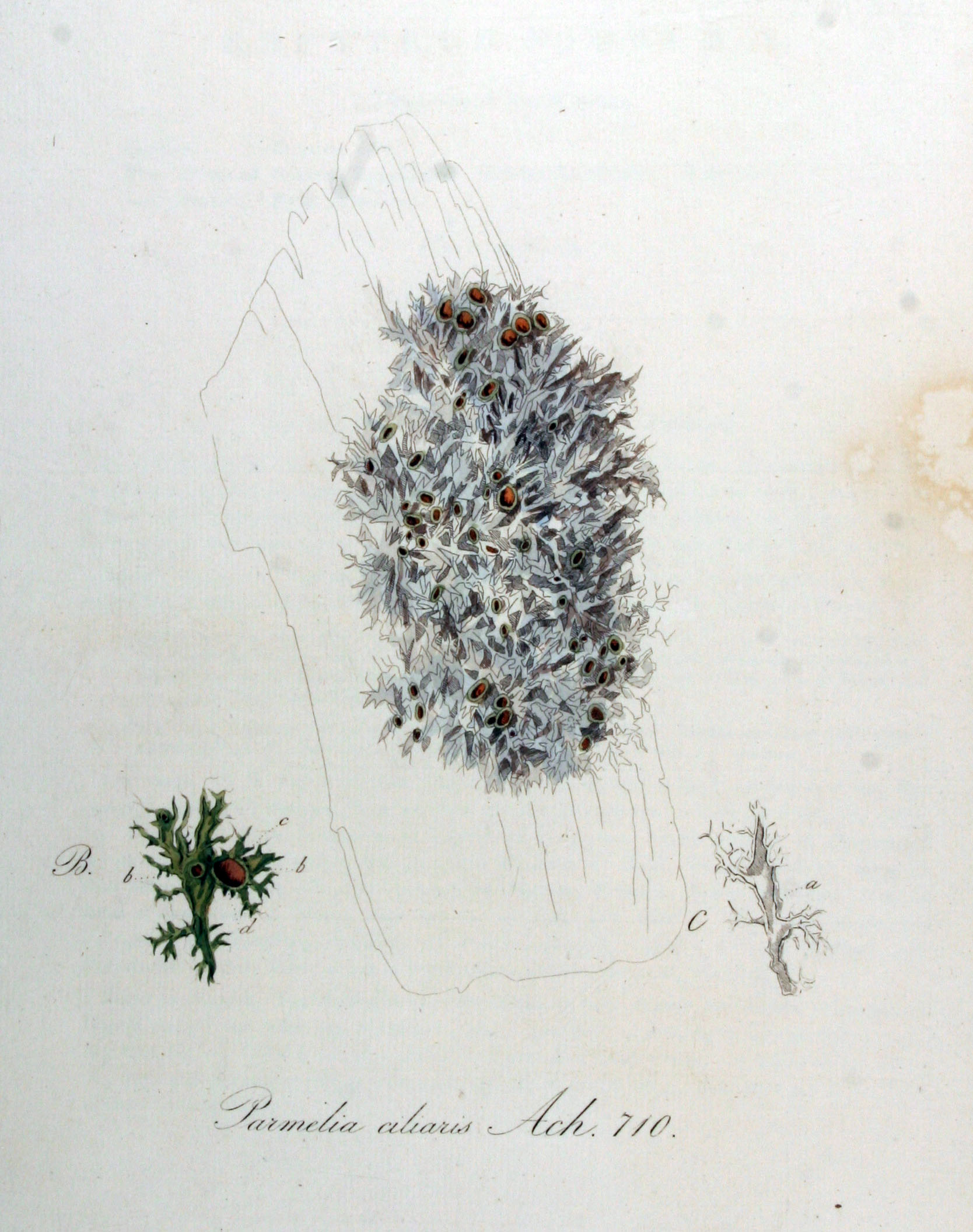 Parmelia ciliaris (Linnaeus) Acharius 1803